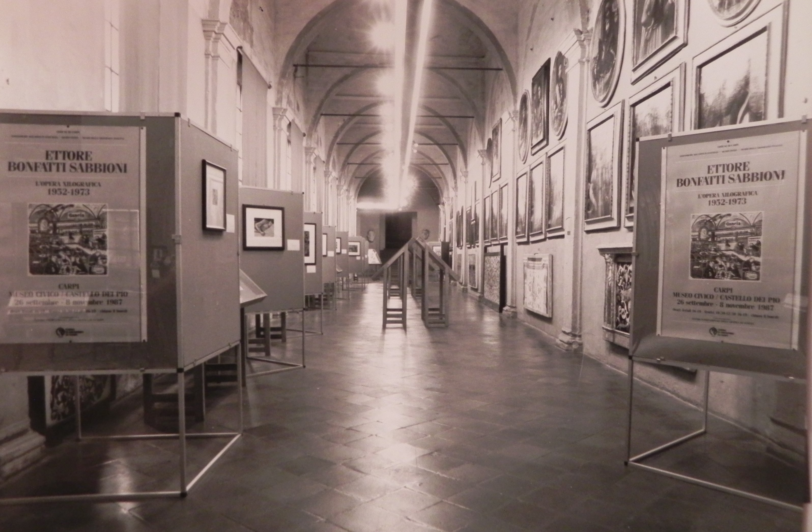 1987 Mostra di xilografie, Museo della xilografia italiana, Castello dei Pio, Carpi, mostra curata dalla vedova Eugenia Pizzasegola.